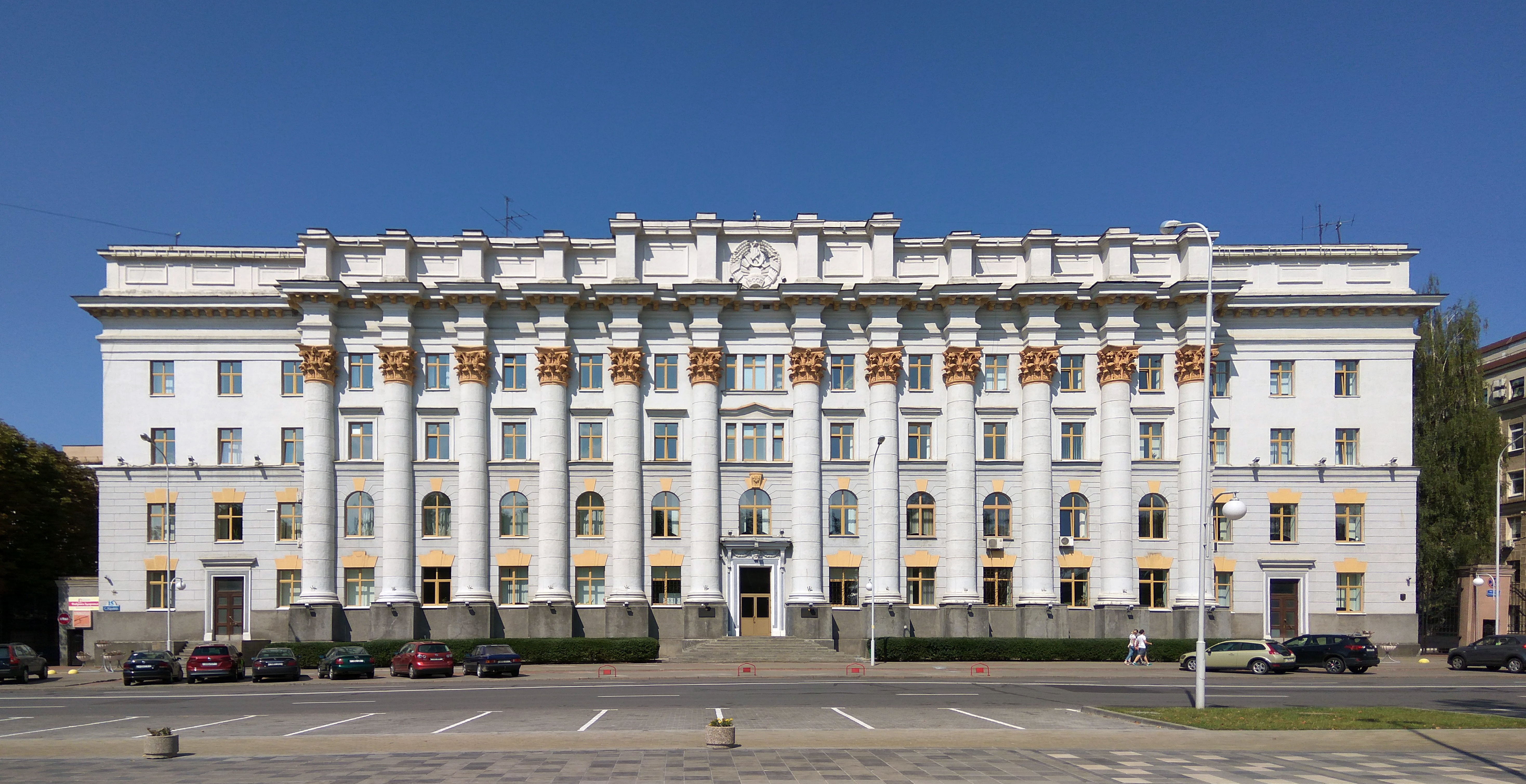 Будынак Міністэрства сельскай гаспадаркі і харчавання Беларусі